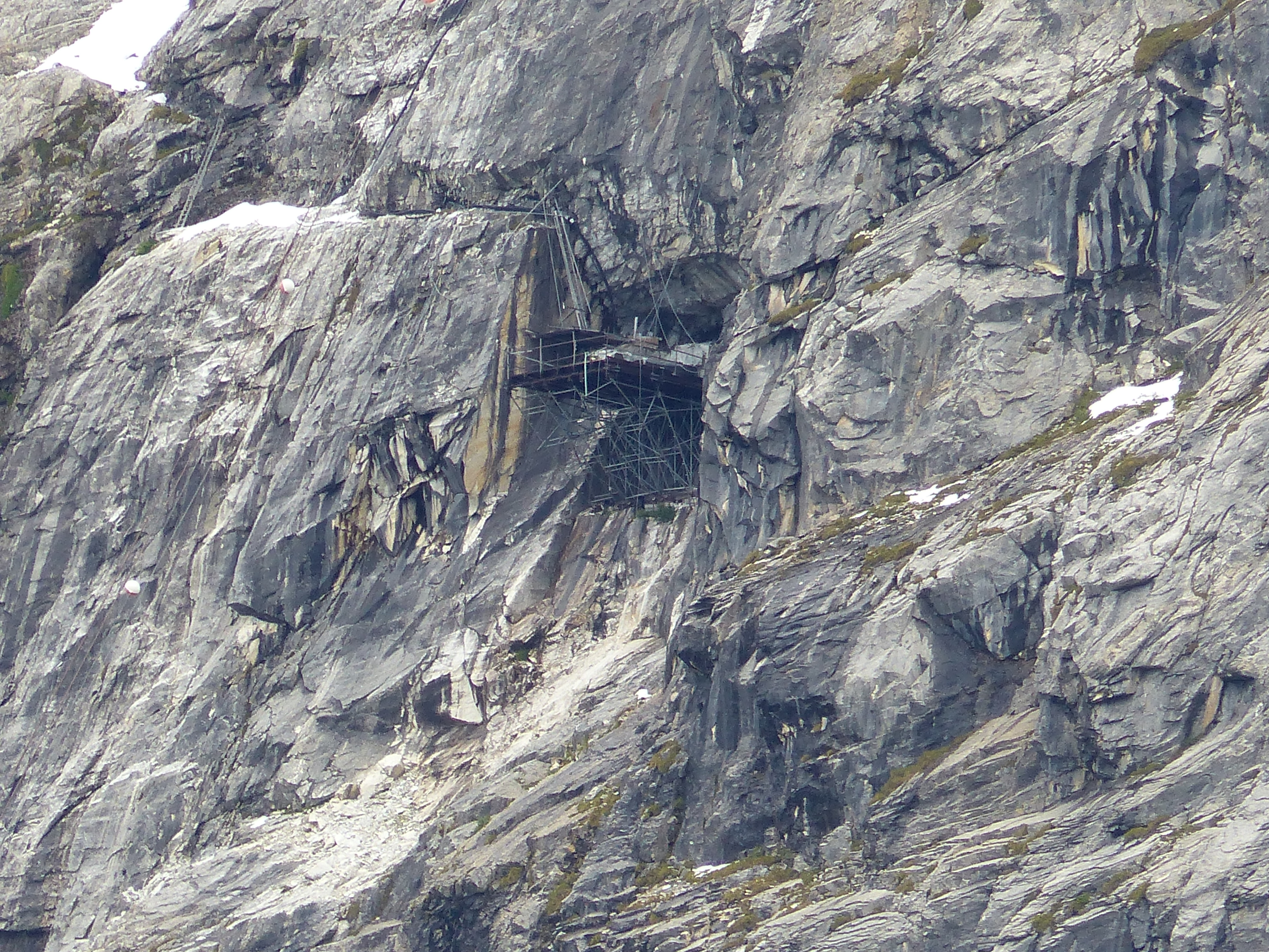 Stolleneingang zum oberen Jennwandbruch (Mitte)